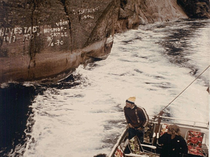 Trollfjord am Raftsund Fotograf: presse03, selbst erstellt, Sommer 1975 Lizenz: GNU-FDL